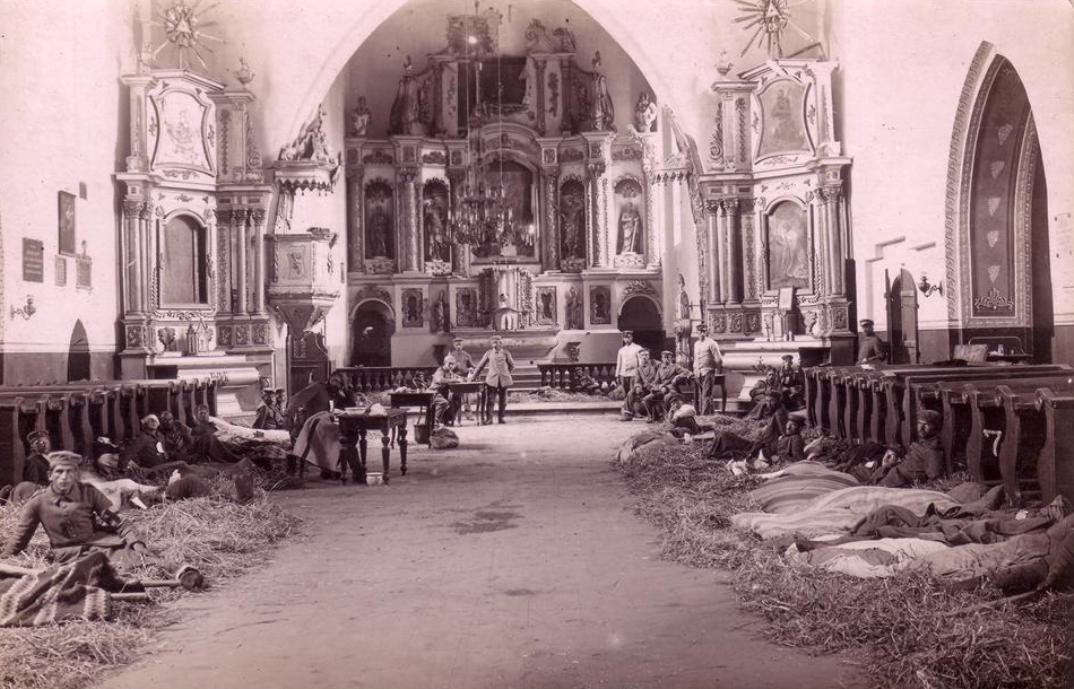 Przasnysz, 1915r. Kościół Parafialny zamieniony na lazaret podczas działań wojennych